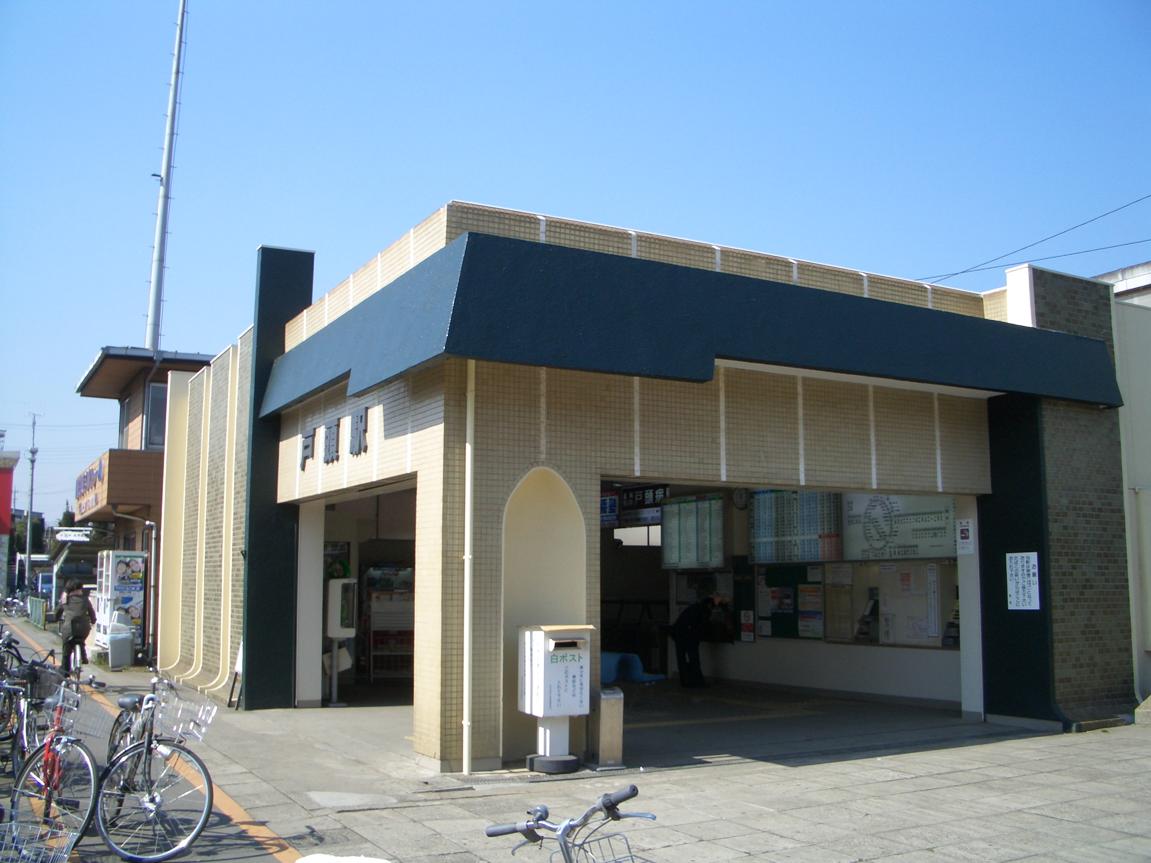 Togashira Station,Togashira Toride-City Ibaraki Japan.